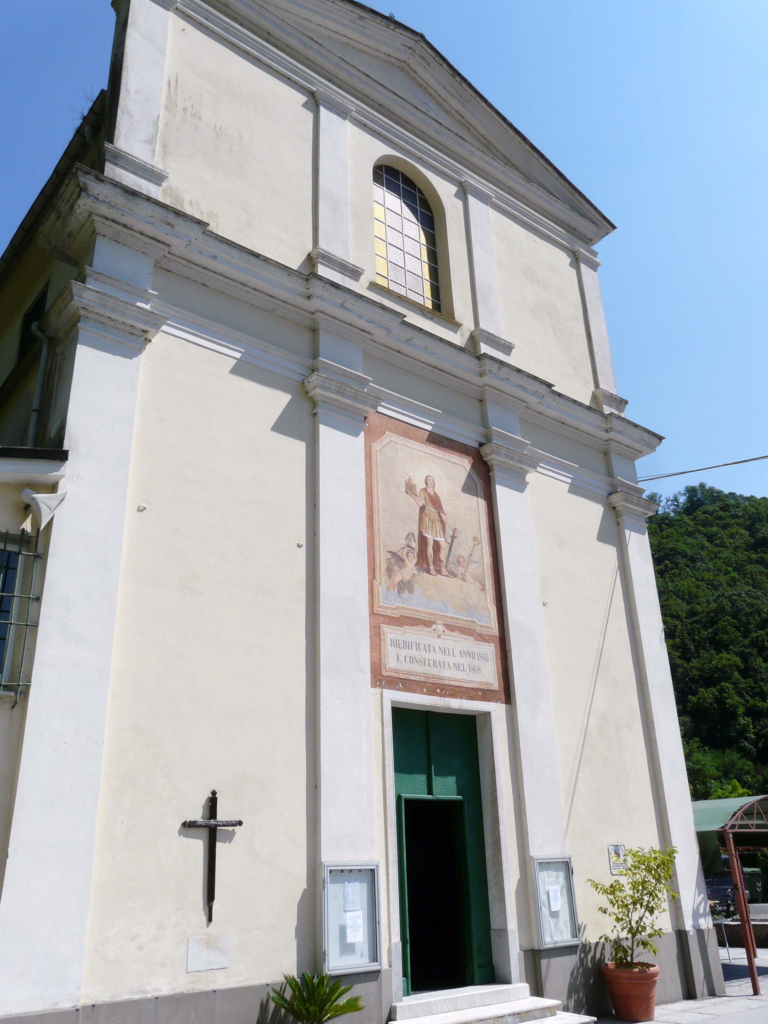 Prioria di Sant'Eufemiano, Graveglia, Carasco, Liguria, Italia